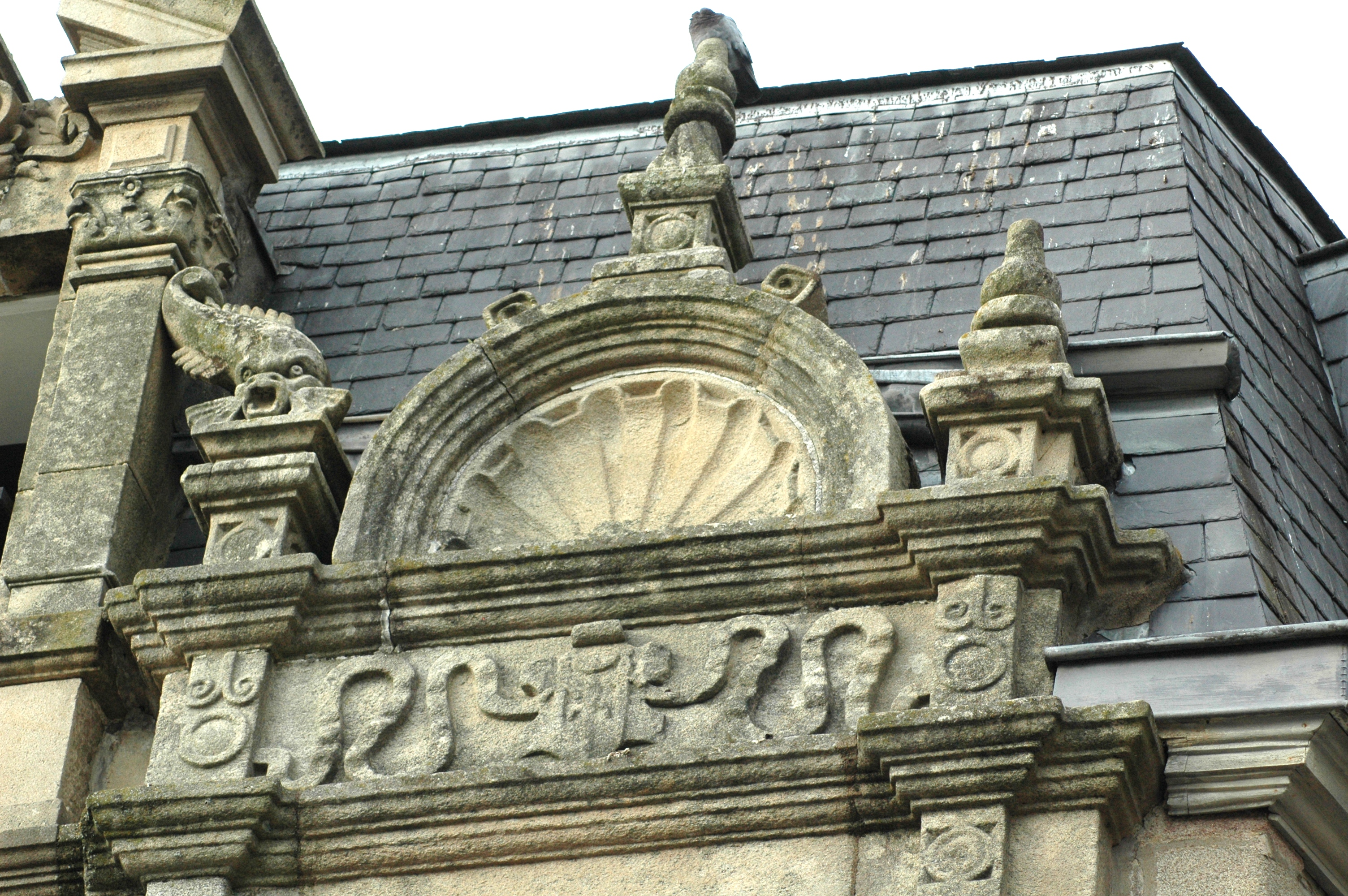 Maison, Place Lamennais (Inscrit, 1925)? Maison construite en 1610, de style Renaissance, par Raoul de la Houlle, Seigneur de Villenart. Sa décoration fait appel au symbole de la coquille Renaissance. Détail coquille au-dessus de la fenêtre. .